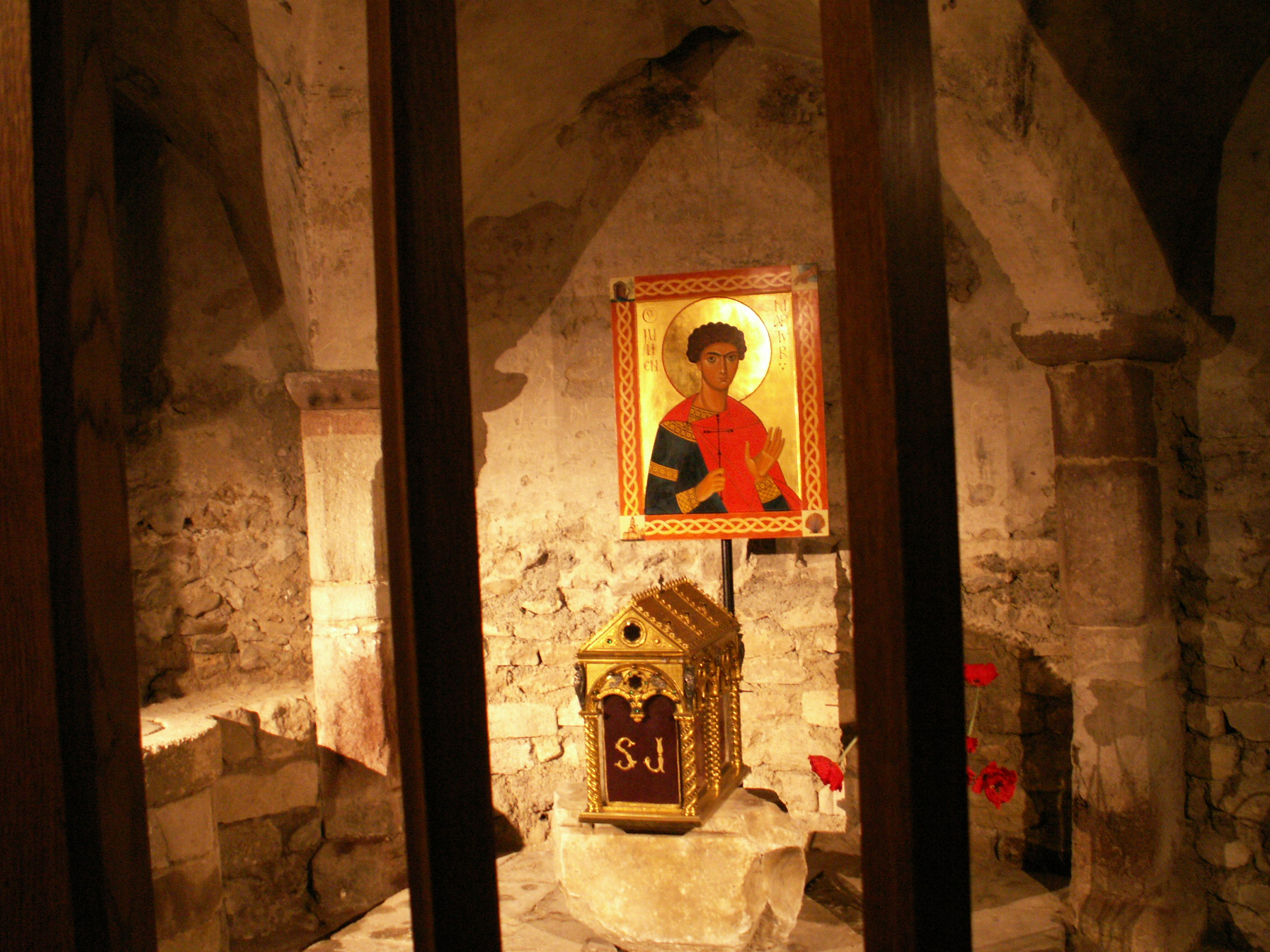 Reliquaire du XIXe S. et icône datant du XXIe S. présentant saint Julien de Brioude.